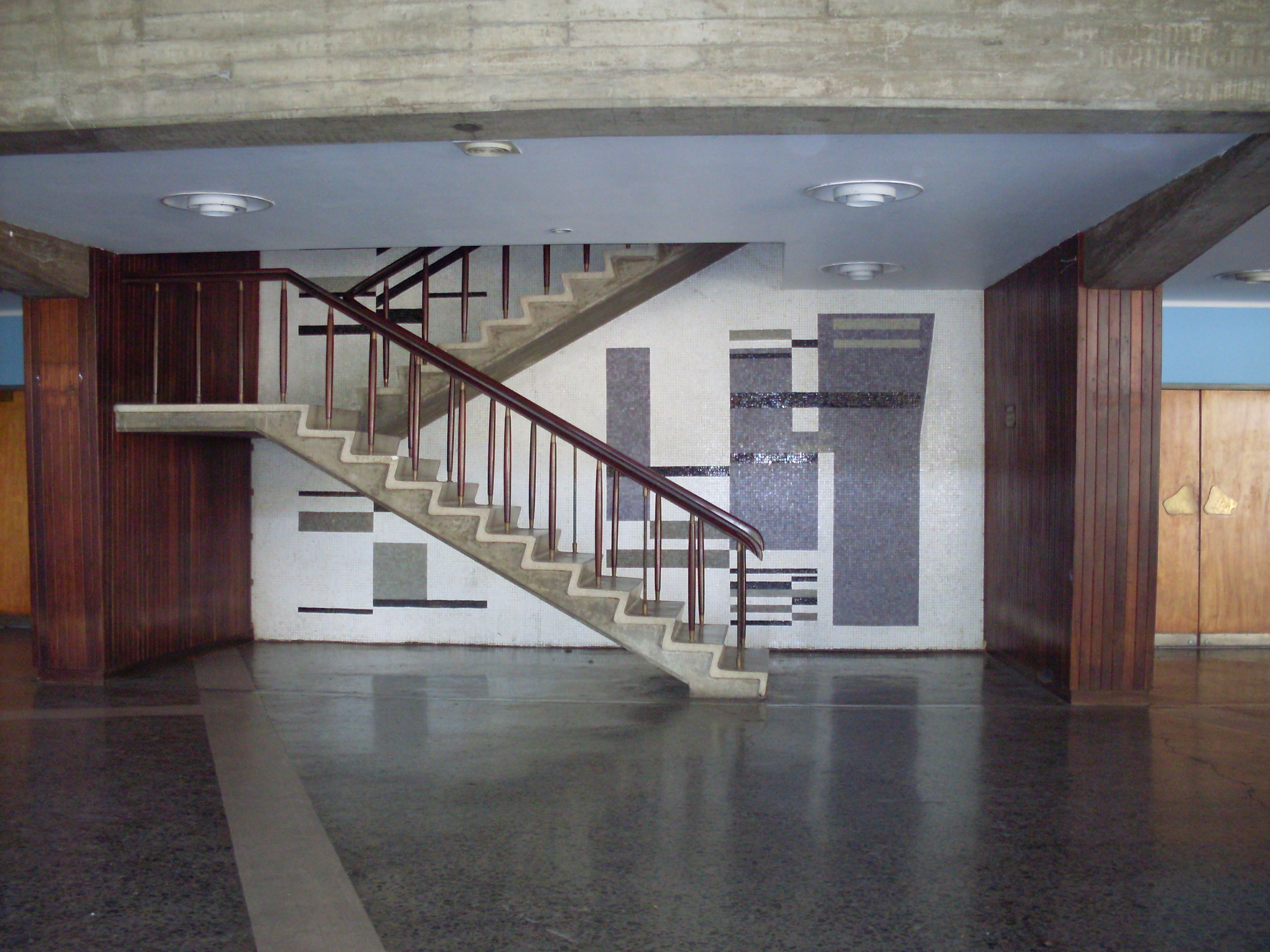 Mural de Carlos González Bogen, 1953. Título: Sin título. Autor: Carlos González Bogen. Año: 1953. Ubicación: Universidad Central de Venezuela, Edificio del Aula Magna.